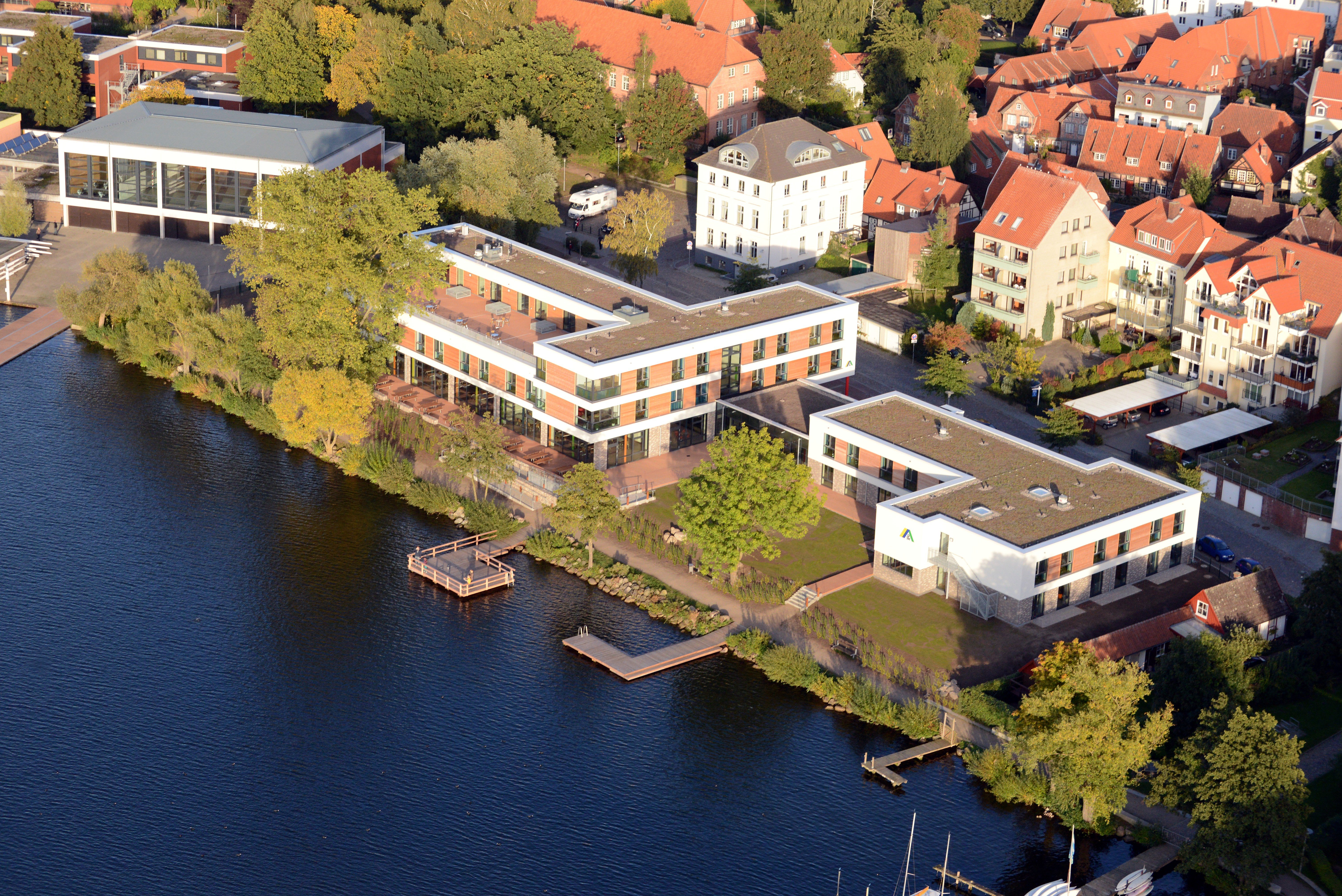 Jugendherberge Ratzeburg am Ufer des Ratzeburger Sees im Naturpark Lauenburgische Seen.